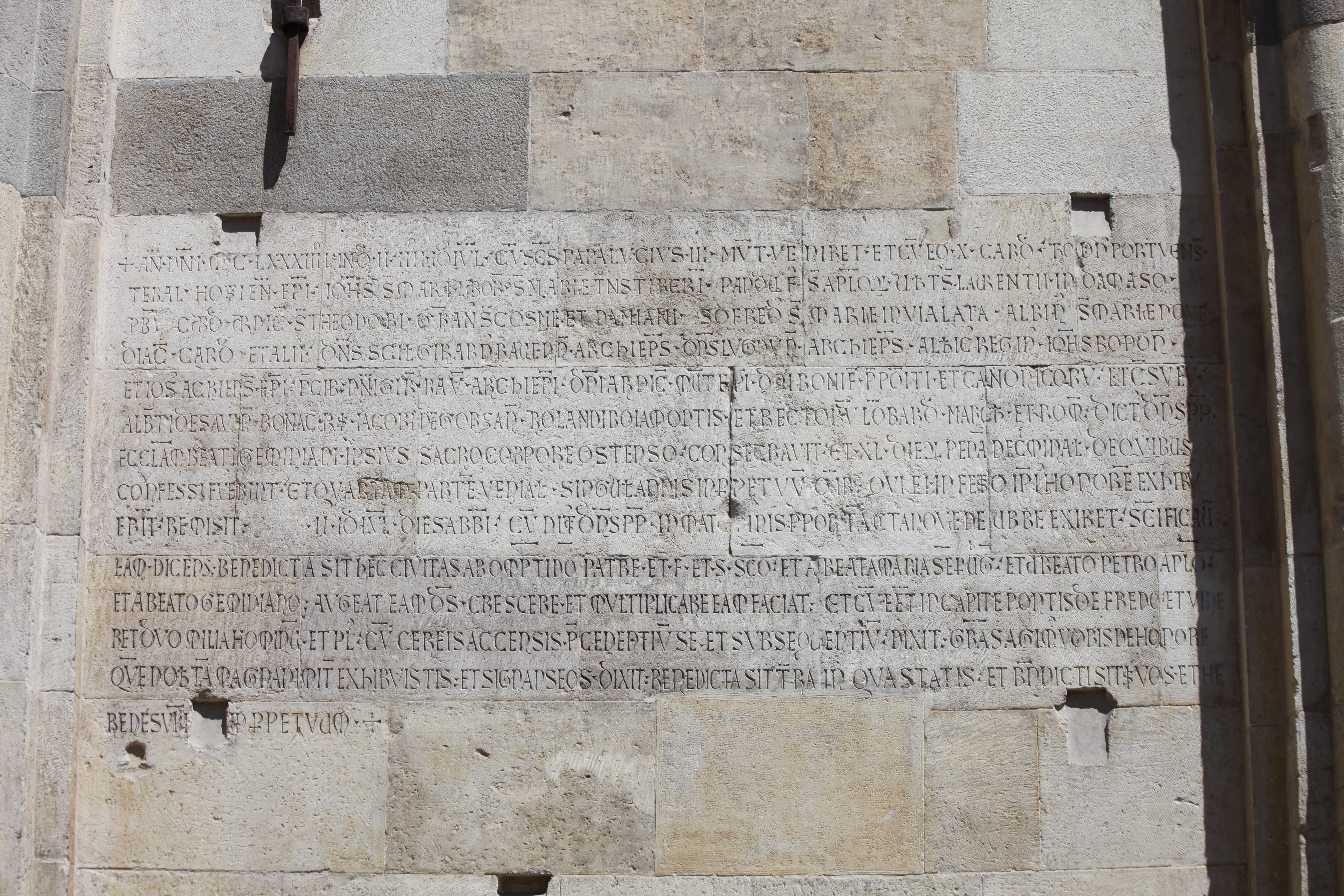 Duomo (solo esterni) This is a photo of a monument which is part of cultural heritage of Italy.